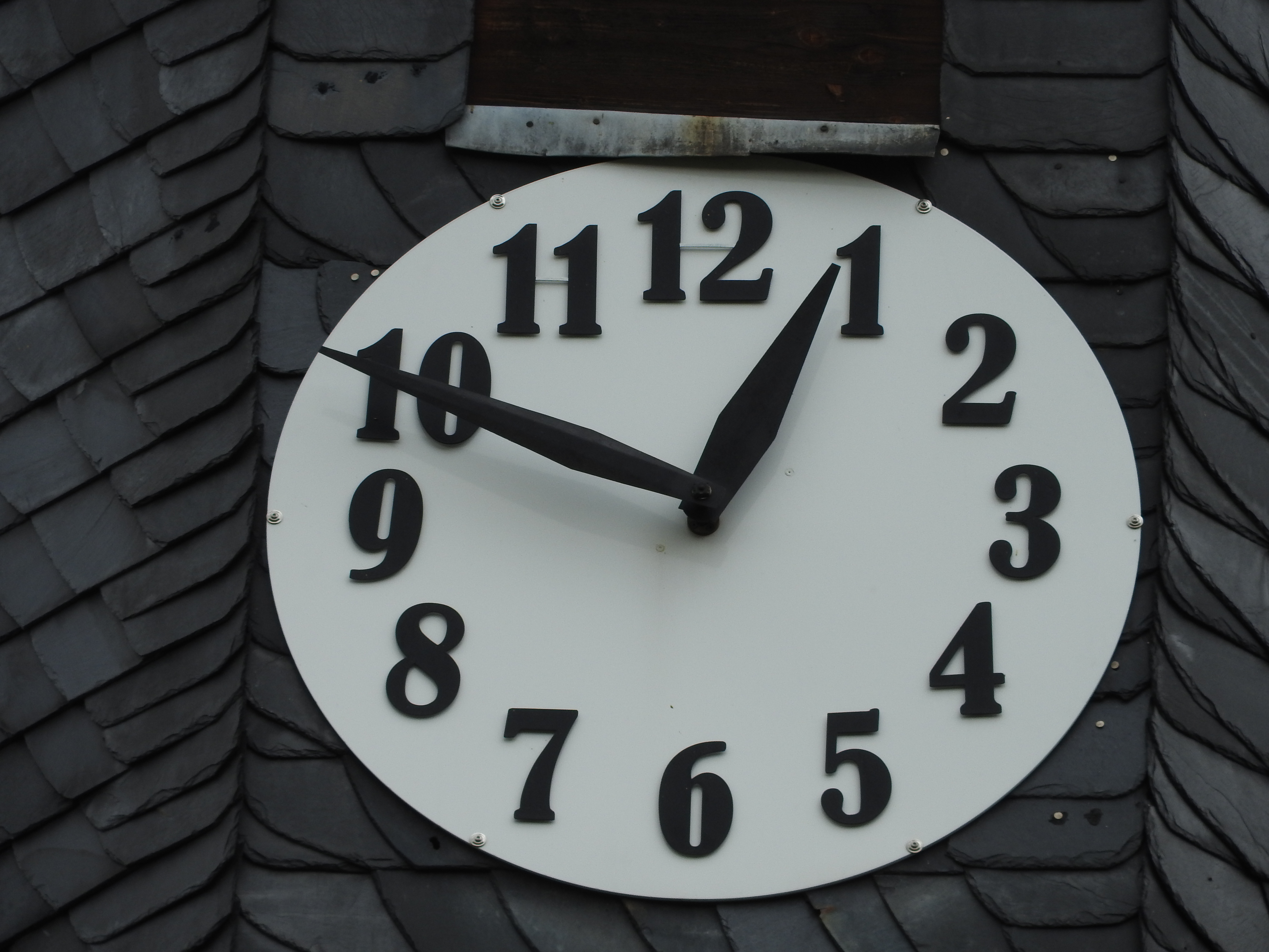 Turmuhr der Kirche in Letzendorf, Thüringen